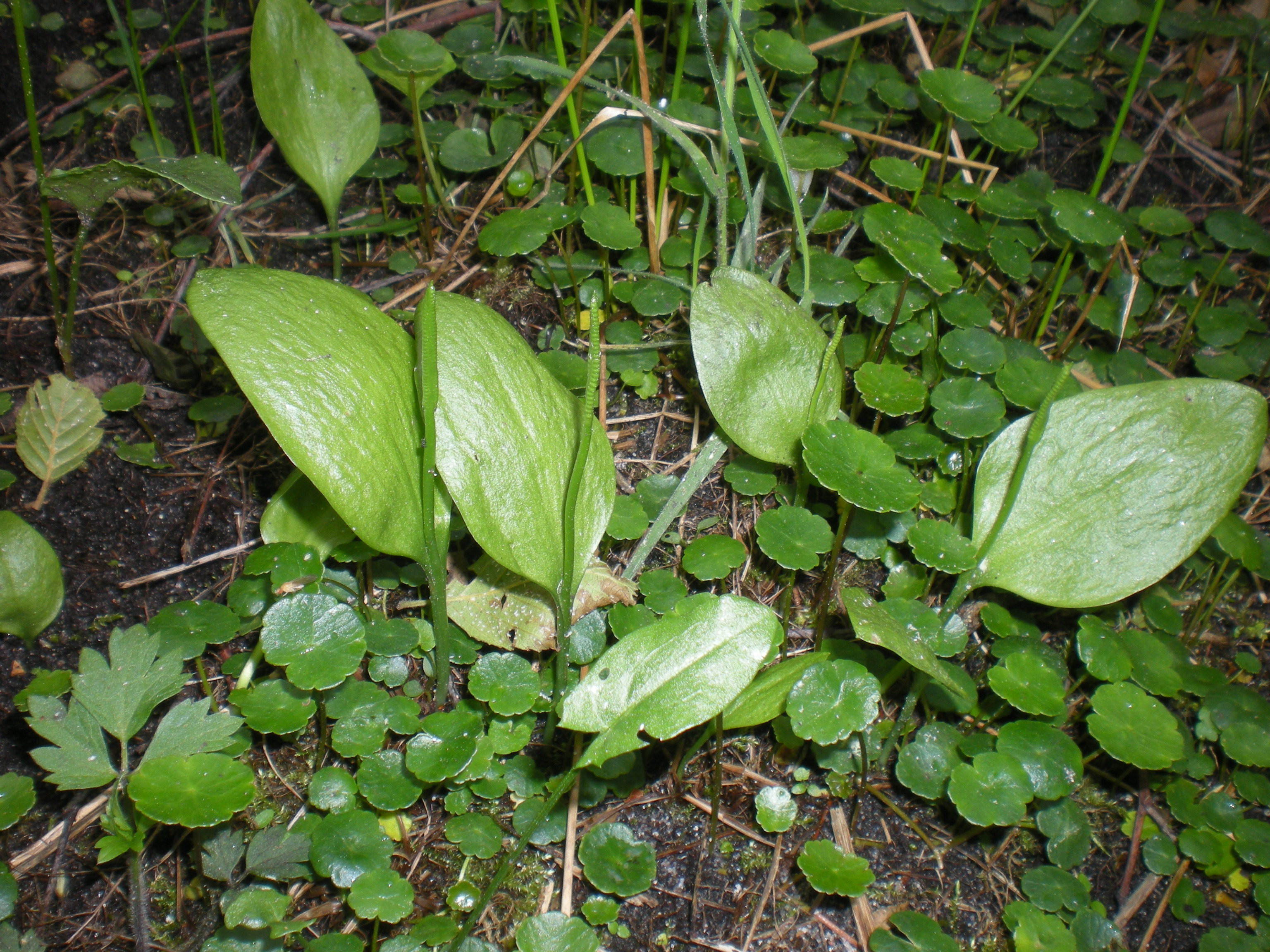 Nasięźrzał pospolity